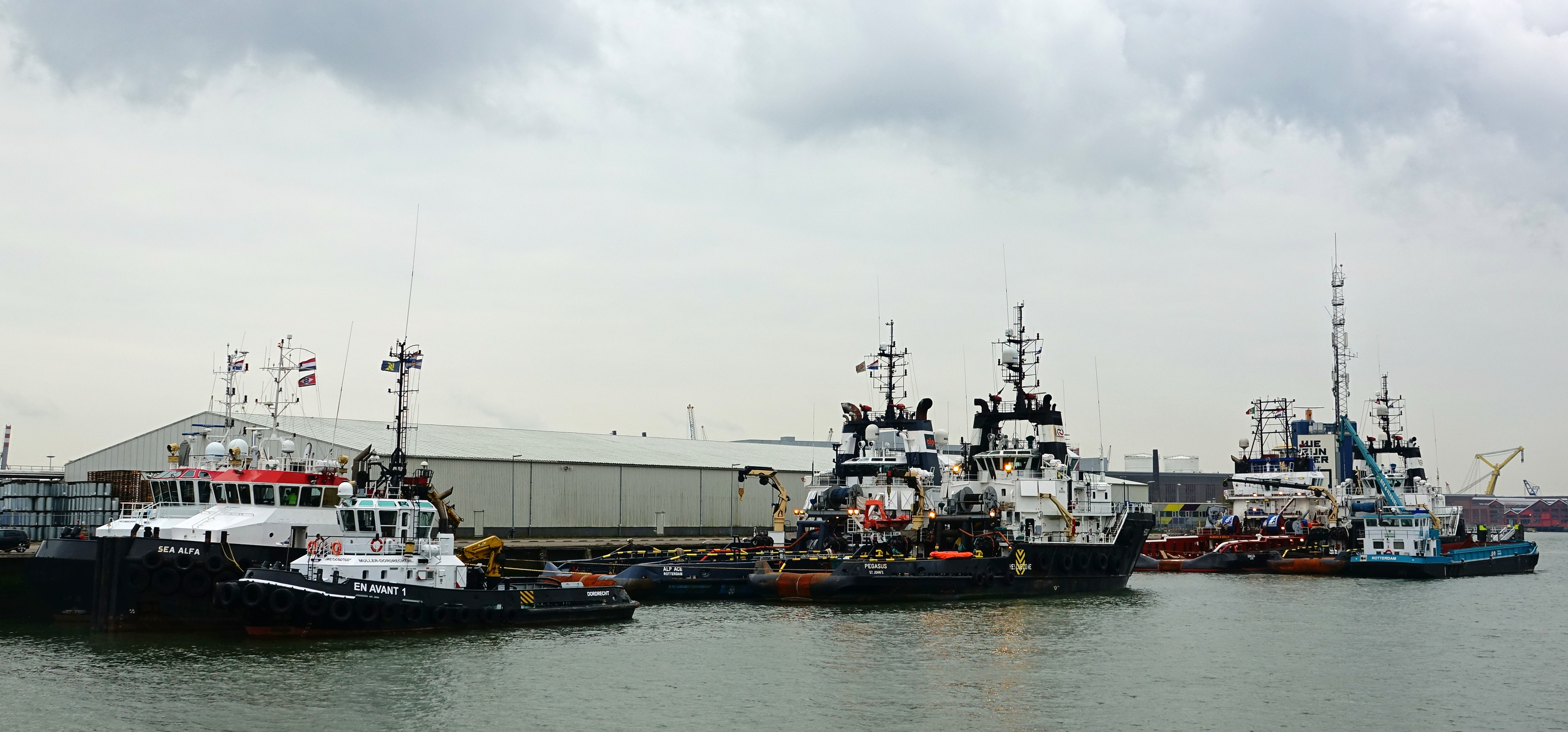 Lekhaven Rotterdam 14-4-2017